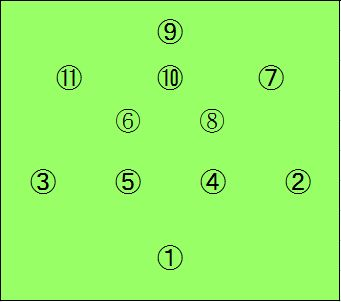 サッカーの背番号の並び方（画像）